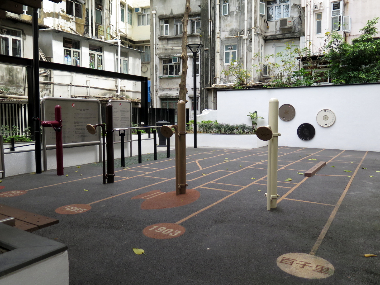 Pak Tsz Lane Park Elderly Fitness Corner